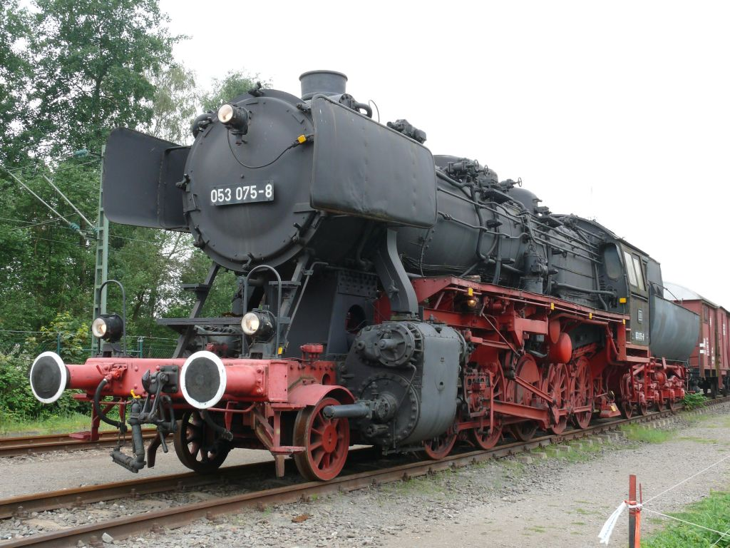 DRB Baureihe 50